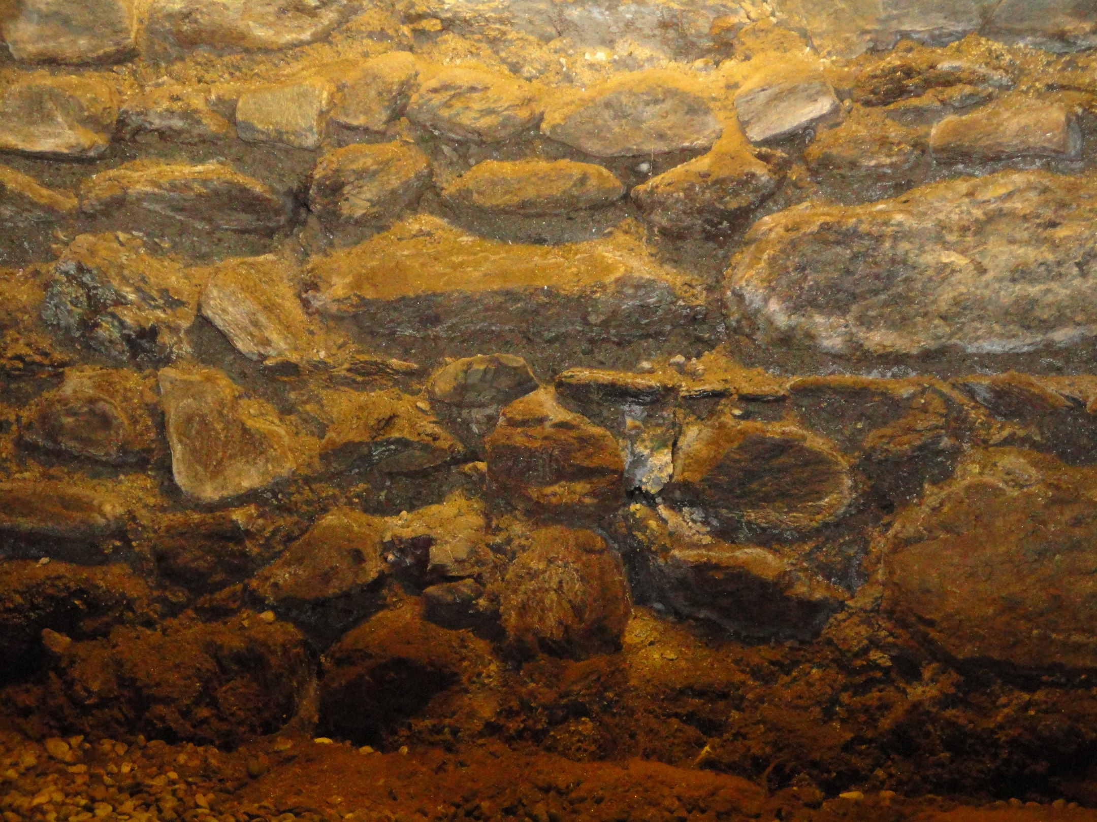 Muro di cinta dell'area sacra di Bioggio